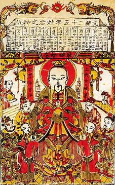 Chinesisches Neujahrsbild für das Jahr Guangxu (1899/1900)